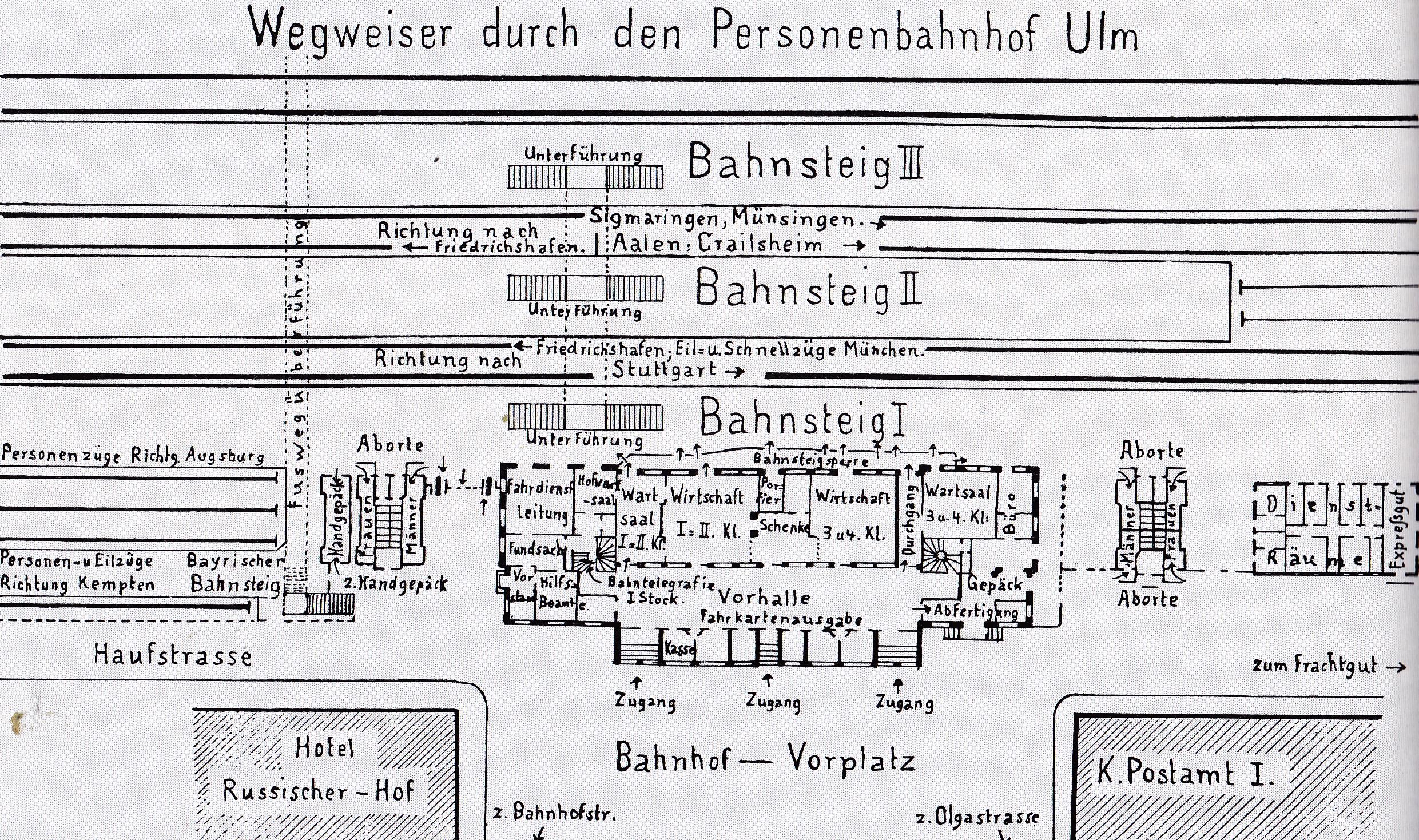 Plan des Bahnhofs Ulm um 1890